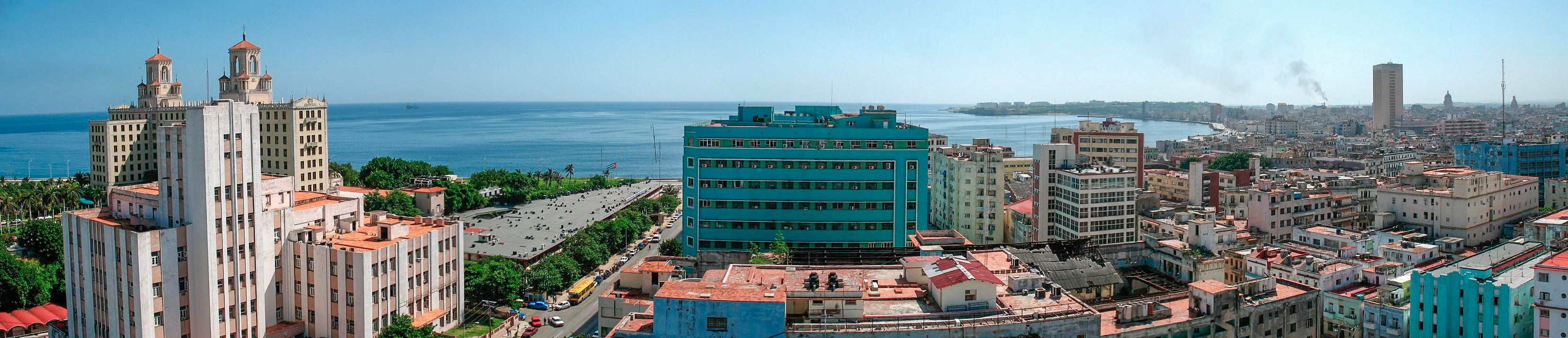 Panorámica de La Habana desde uno de los hoteles de la zona de El Vedado. Panoramic view of La Habana from one of the "El Vedado" hotel´s area.